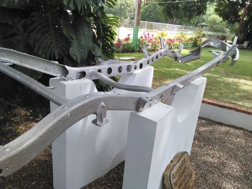 Chasis del Jeep en el que viajaban Las Hermanas Mirabal junto a Rufino de la Cruz en Ojo de Agua, Salcedo.